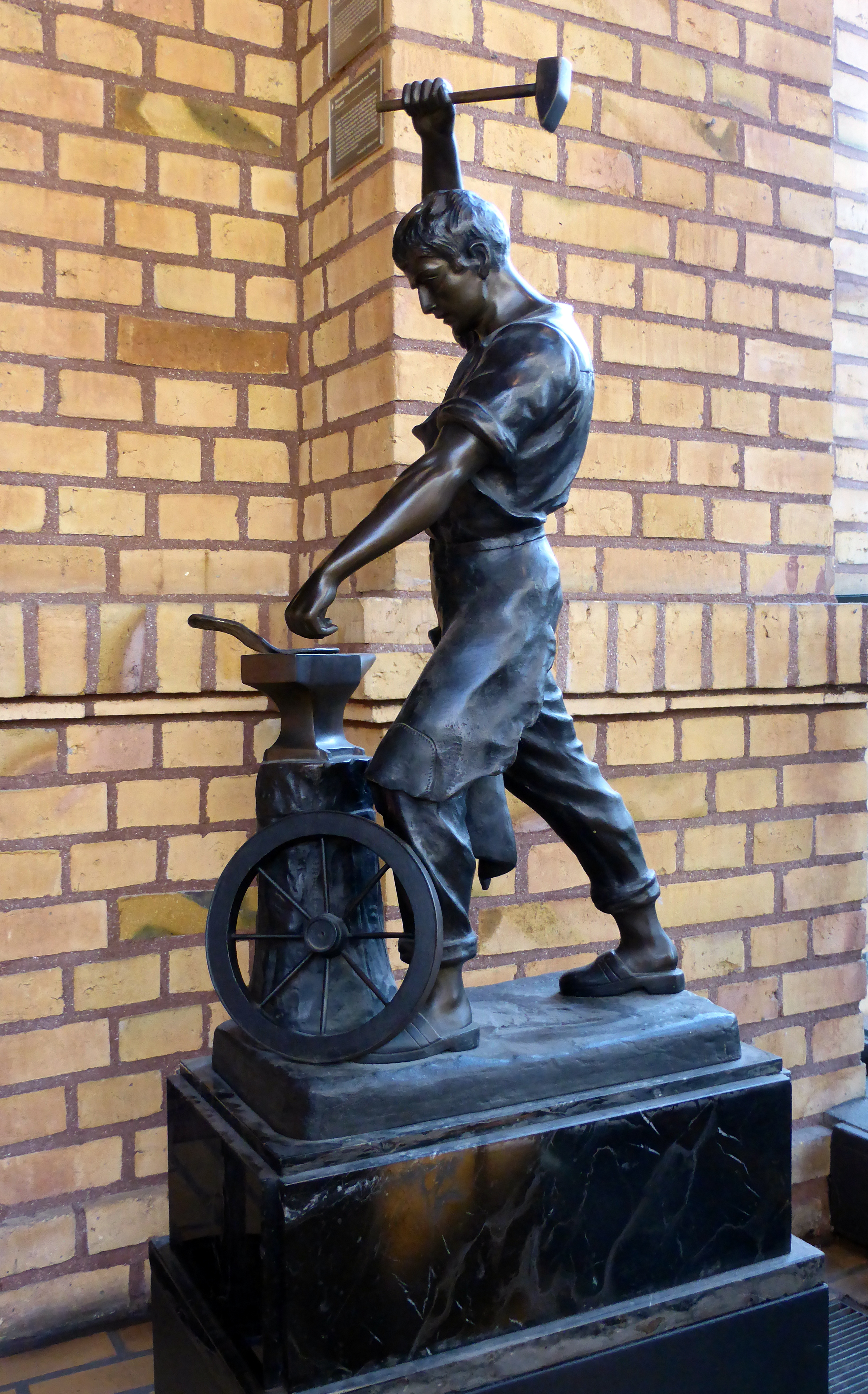 Bronzefigur "Schmied" von 1890 (Vermutlich Bildhauer Arthur Hofmann). Ausgestellt im Deutschen Technikmuseum in Berlin. Inventarnummer: 1/86/1974. Wikipedianische KulTour am 10. Oktober 2015 in der Ausstellung des Museums.